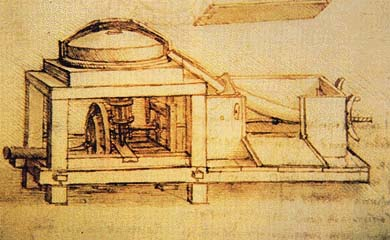 рисунок Леонардо да Винчи - Сепаратор муки